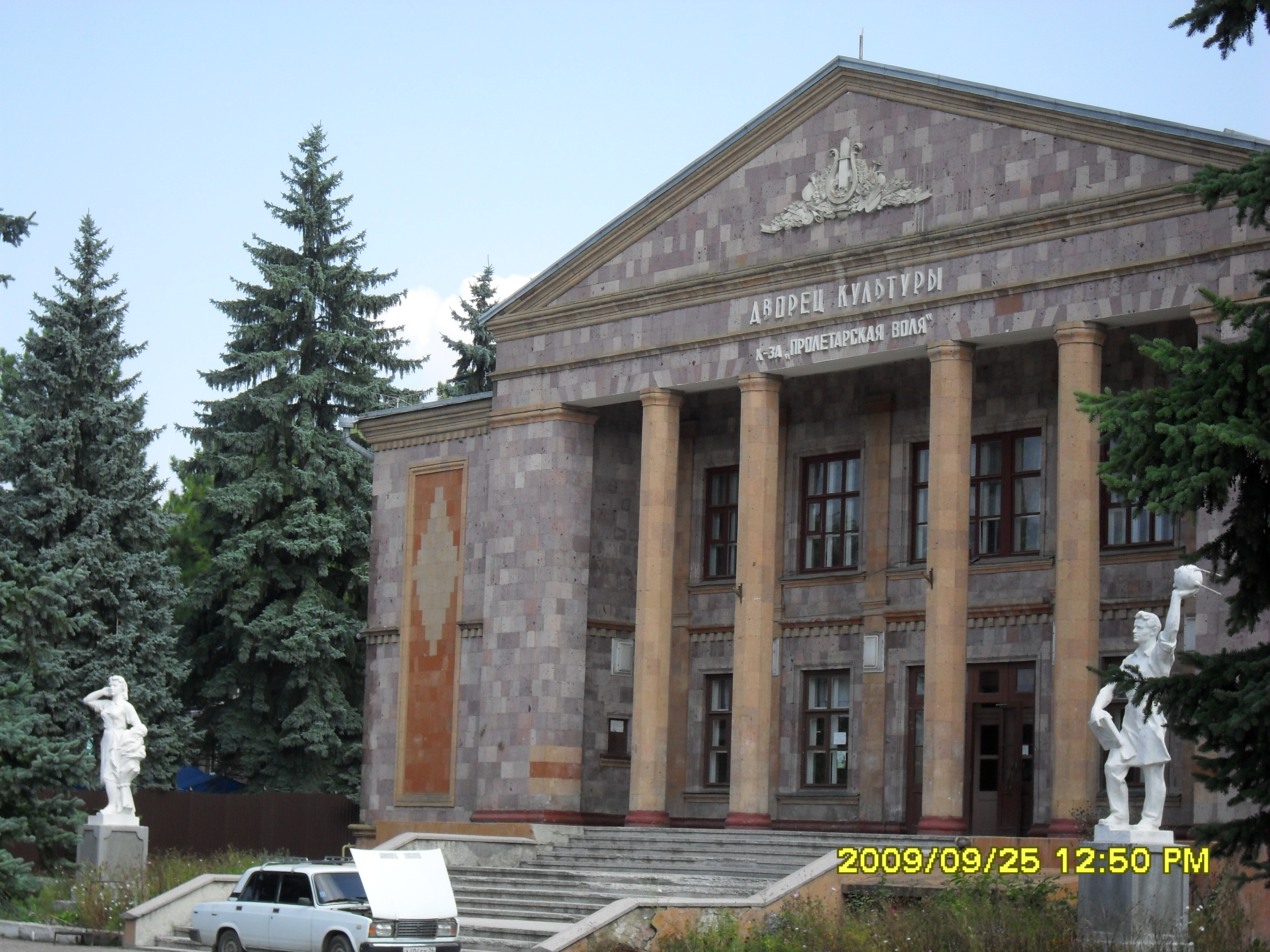 Дворец Культуры к-за "Пролетарская воля"